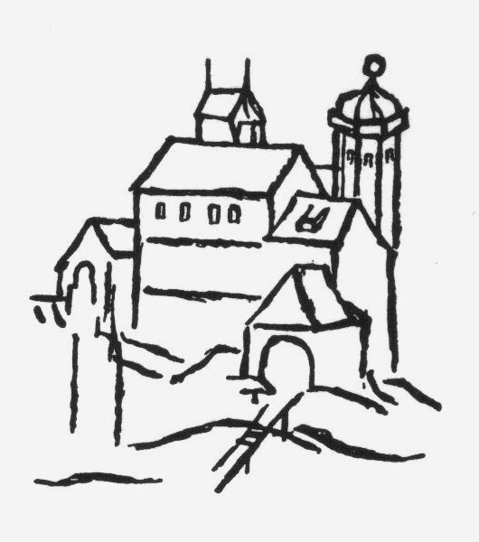 Skizze von Hochschloss Pähl aus dem Jahr 1568